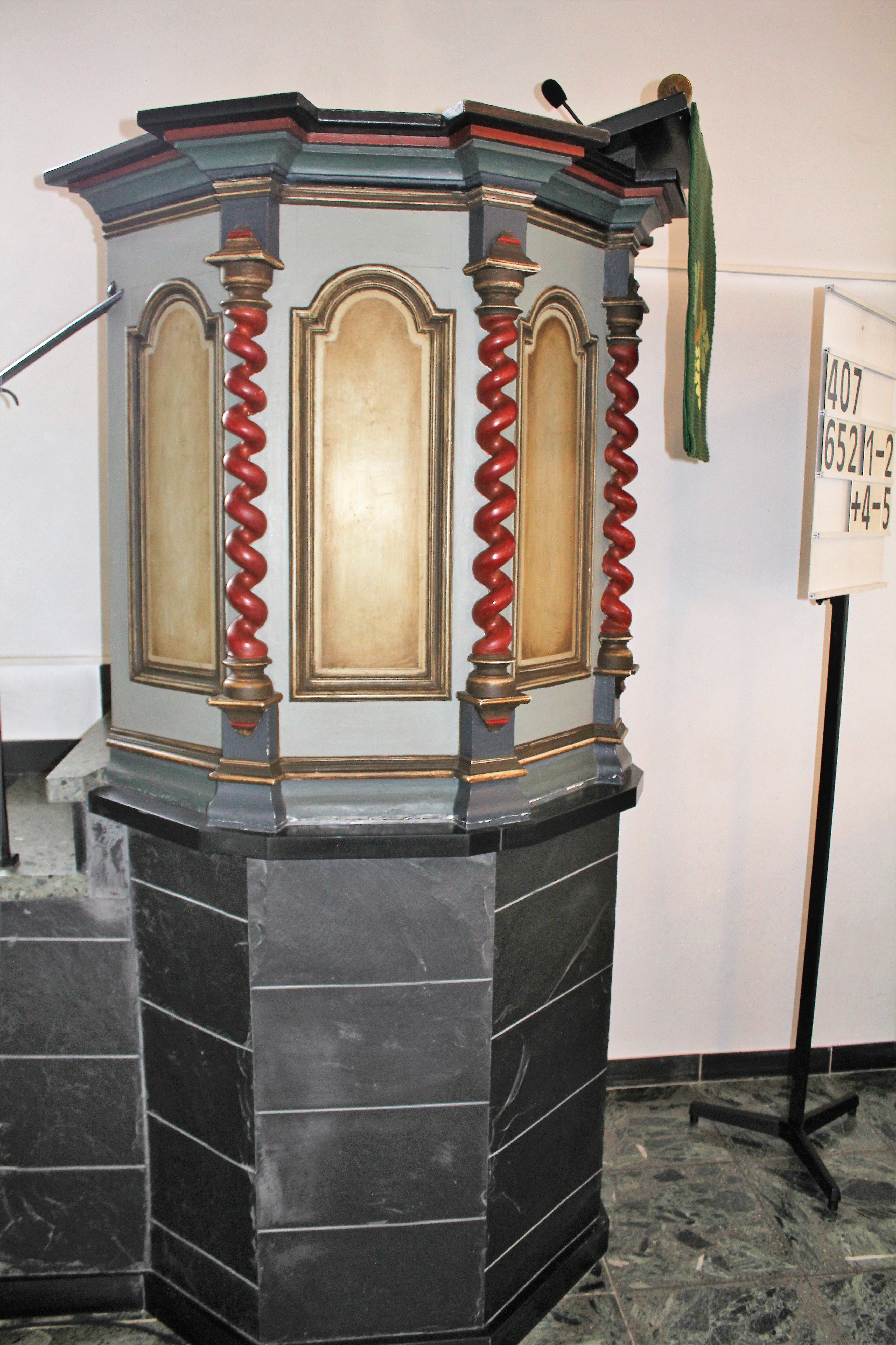 Evangelische Kirche Klein-Rechtenbach, Gemeinde Hüttenberg, Lahn-Dill-Kreis, Hessen, Deutschland